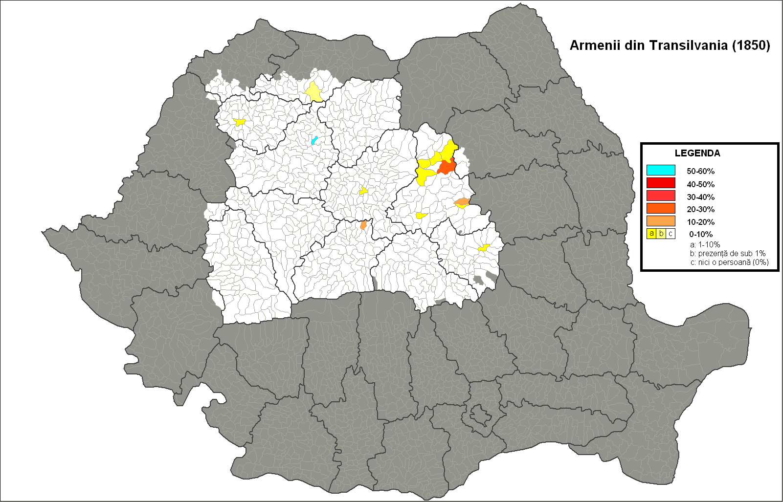 Persoanele declarate drept armeni la recensământul organizat de autorităţile habsburgice în Transilvania în anul 1850. Harta reprezintă limitele administrative actuale: judeţe, comune, oraşe.